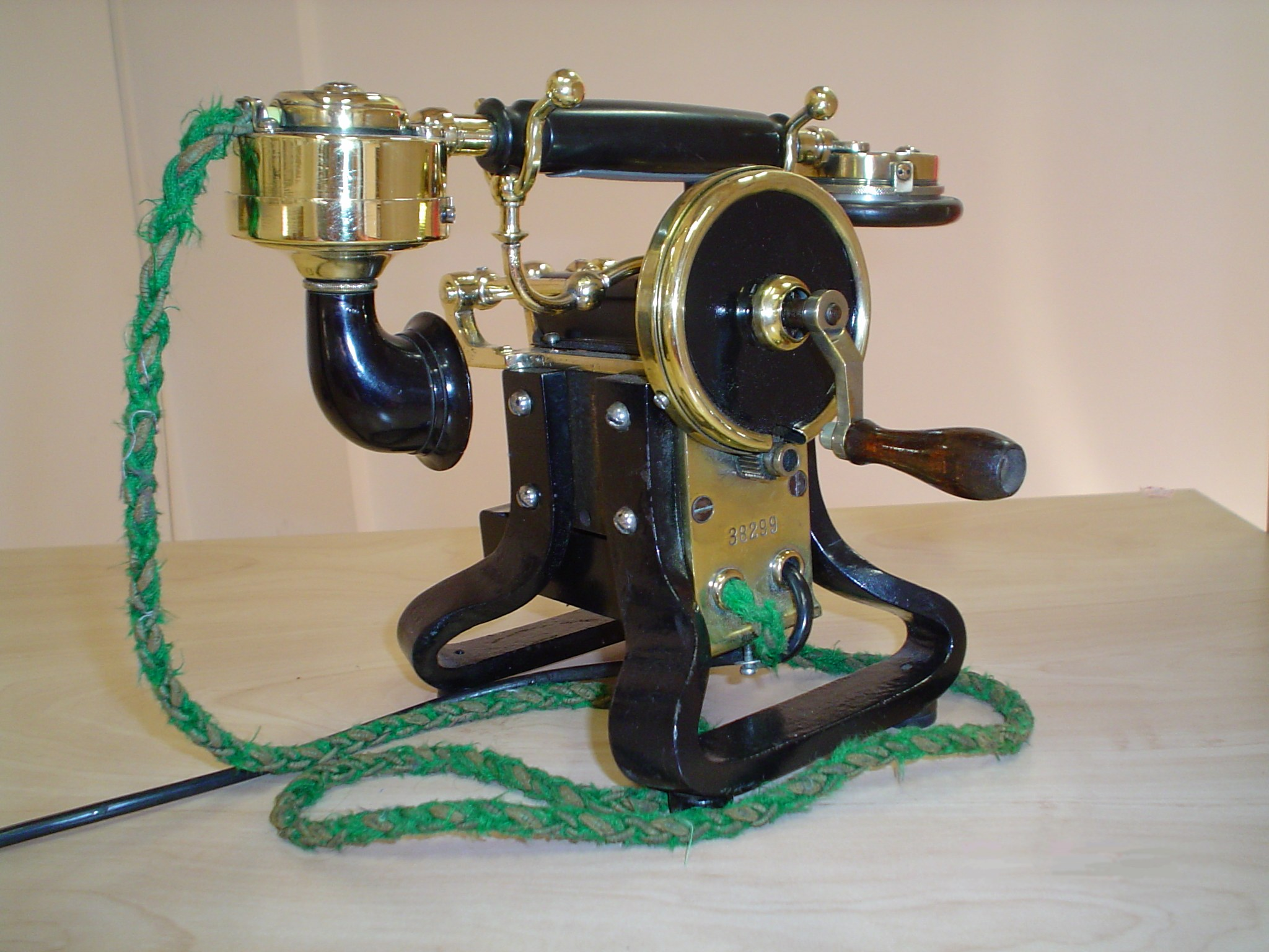 Nuda skeleta telefono. La skeleto estas magnetoj de la kankroinduktilo.